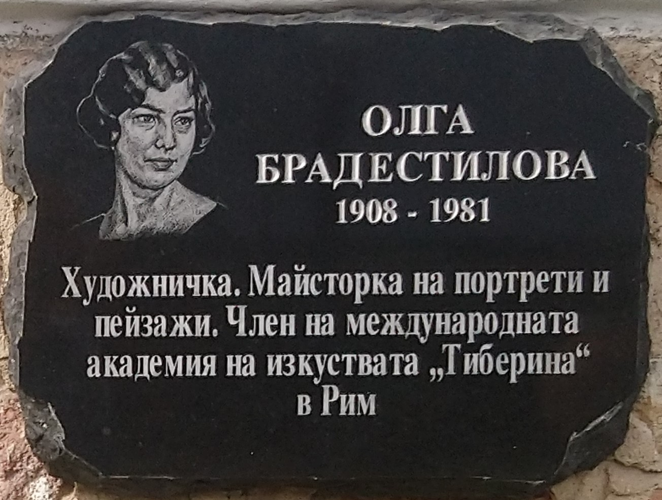 Олга Брадистилова (1908 - 1981) - плоча в Исторически музей Панагюрище - Надпис: Художничка. Майсторка на портрети и пейзажи. Член на международната академия на изкуствата "Тиберина" в Рим.